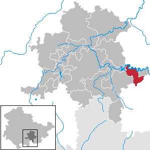 Drognitz in Thuringia - District Saalfeld-Rudolstadt